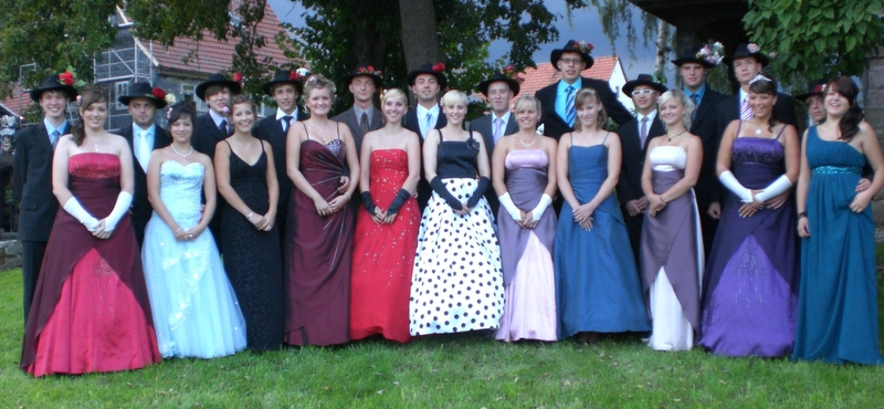 Photo der Kirmesgesellschaft Großenlupnitz im Jahr 2010